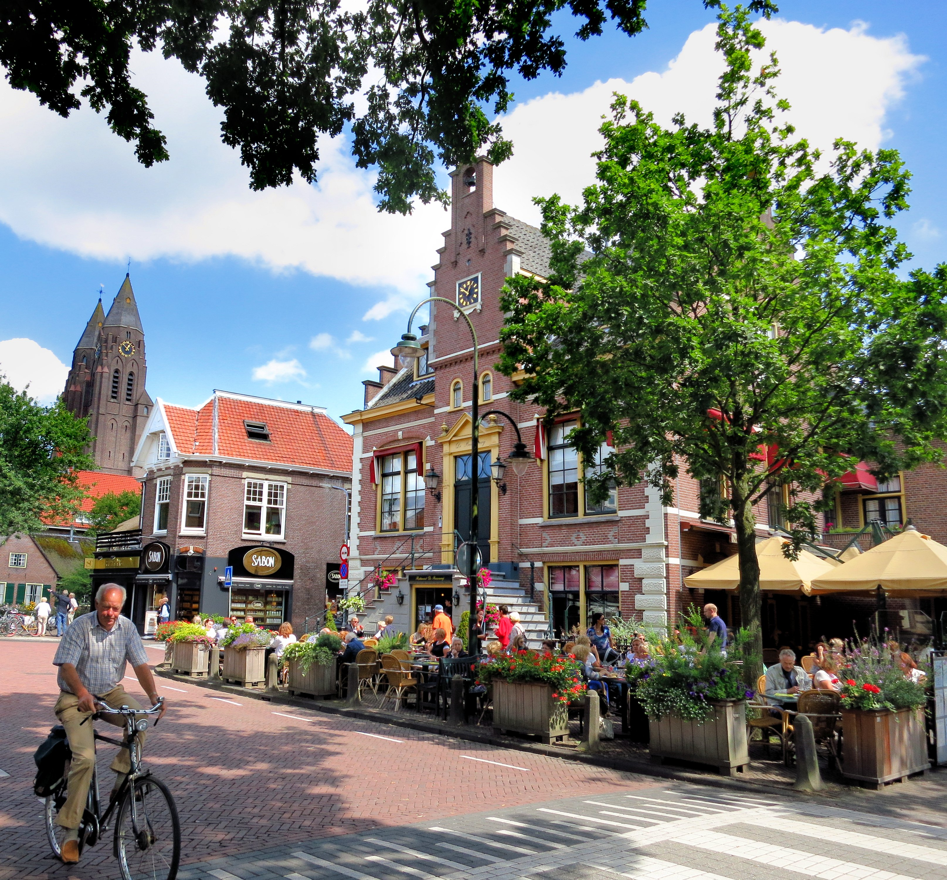 Day 216